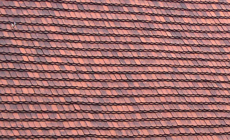 Dach mit Biberschwanzziegeln in Kronendeckung (Ritterdeckung)